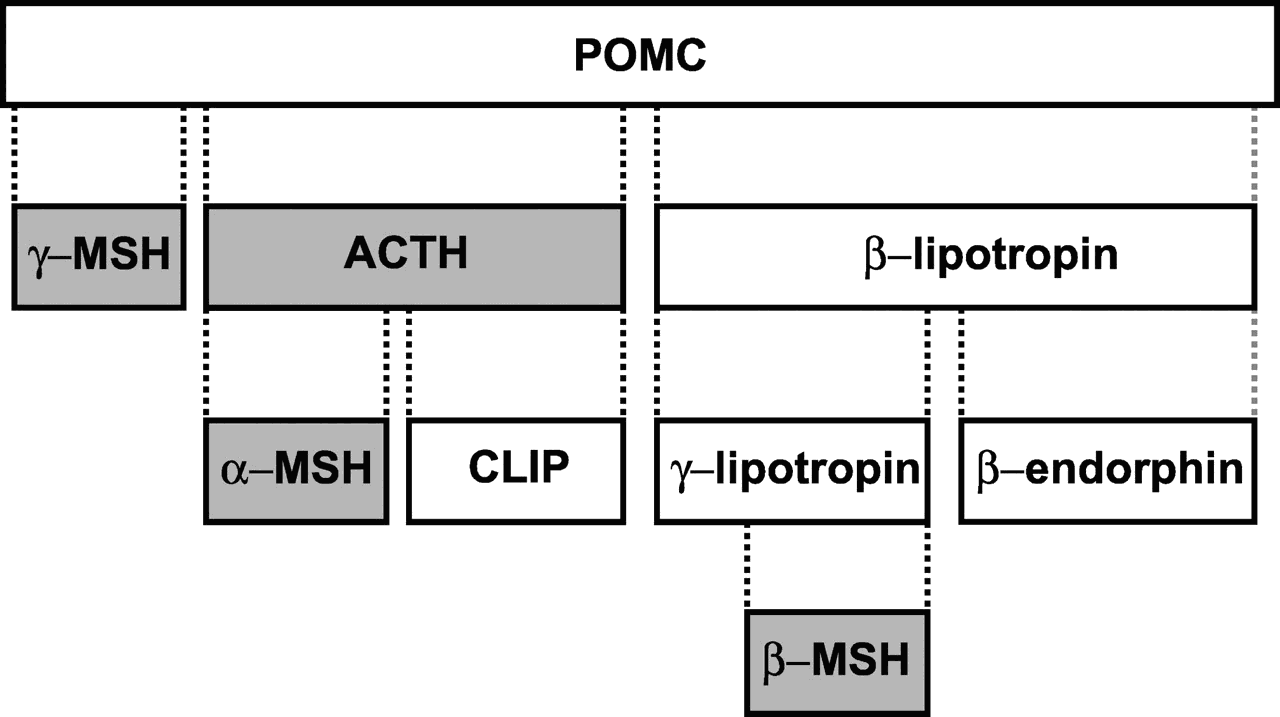 Proopiomelanocortin (POMC) and Melanocortin Peptides.